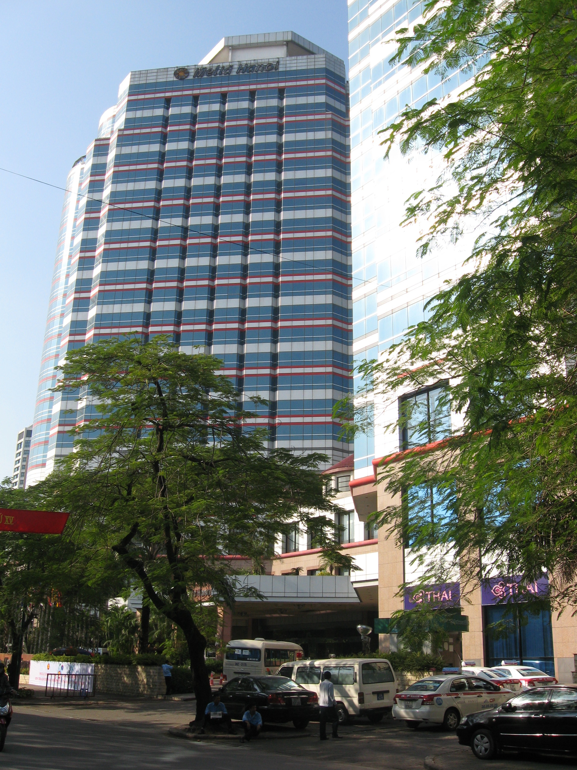 Meliã Hanoi Hotel